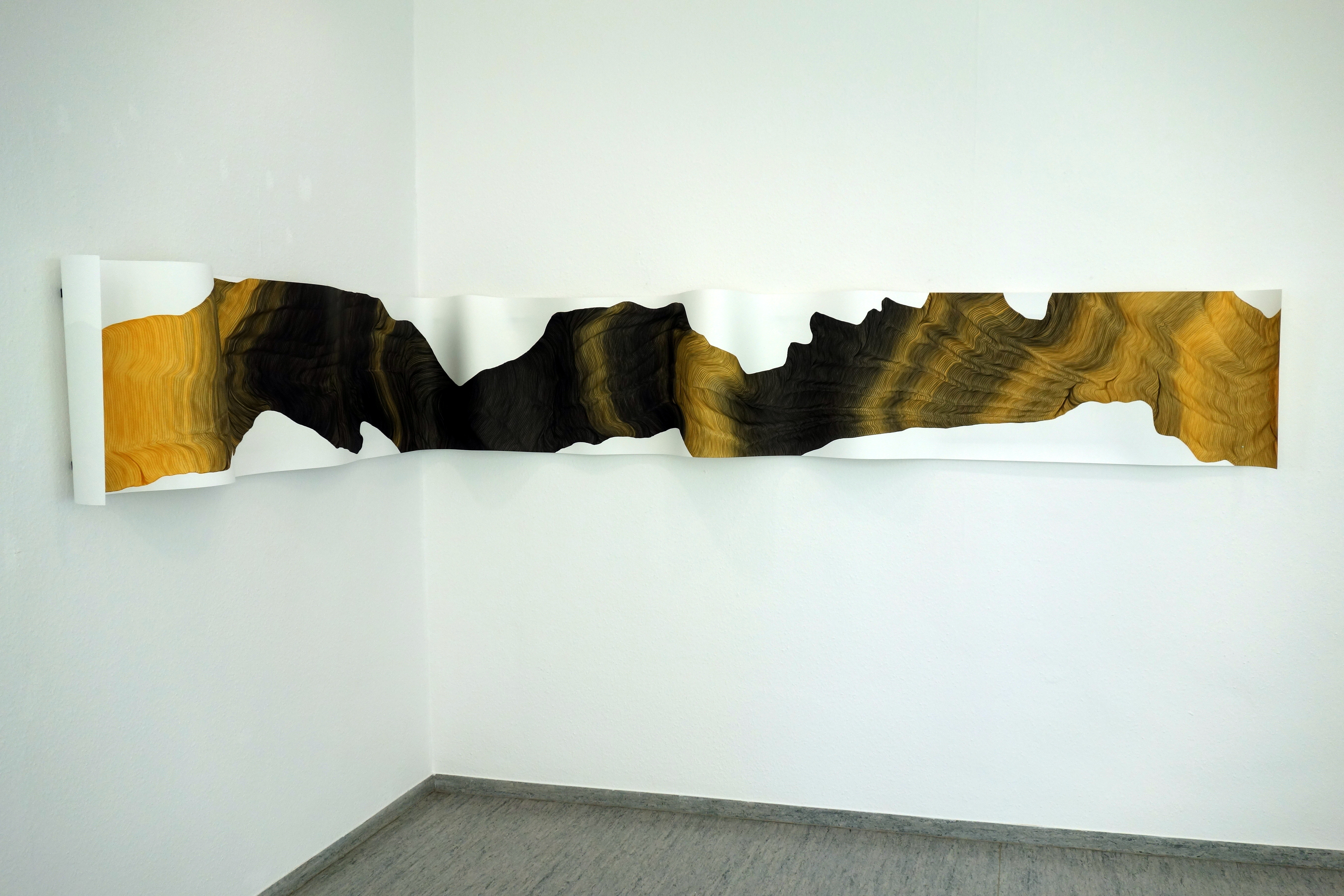 o.T. Tusche auf Papier 50x400cm